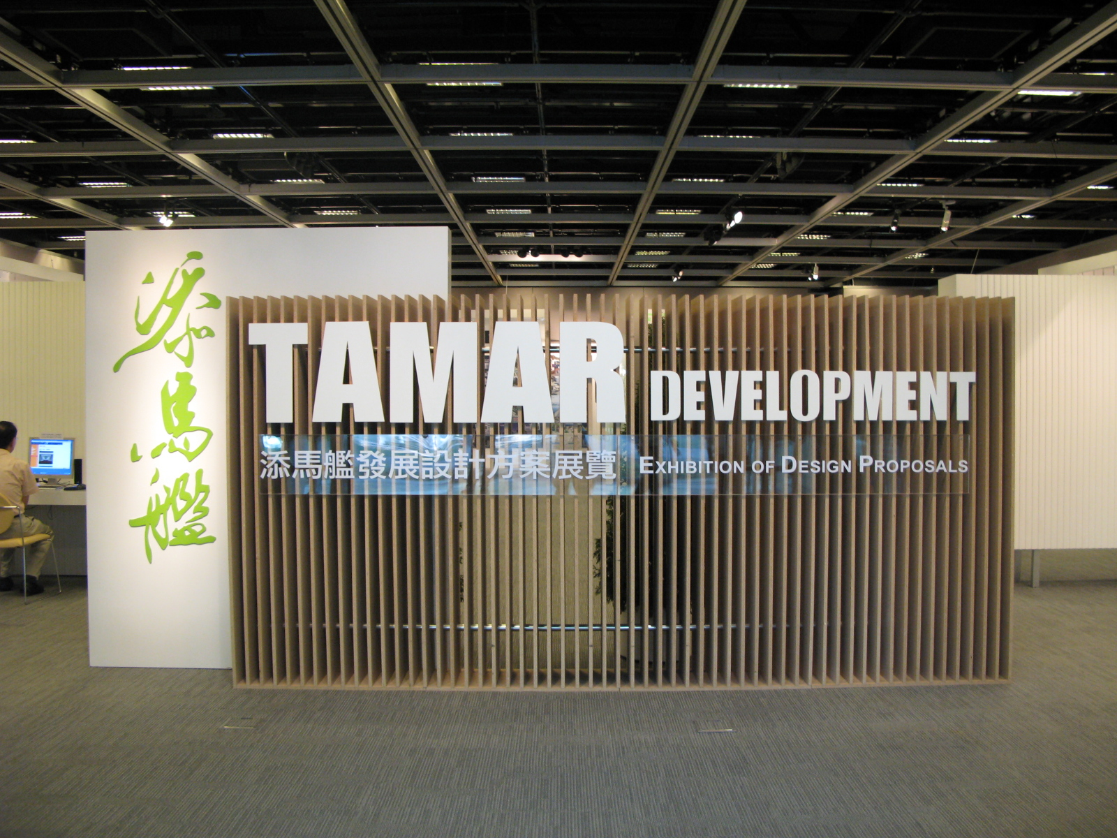 HK Tamar Development Proposal Exhibit 添馬艦發展設計方案展覽